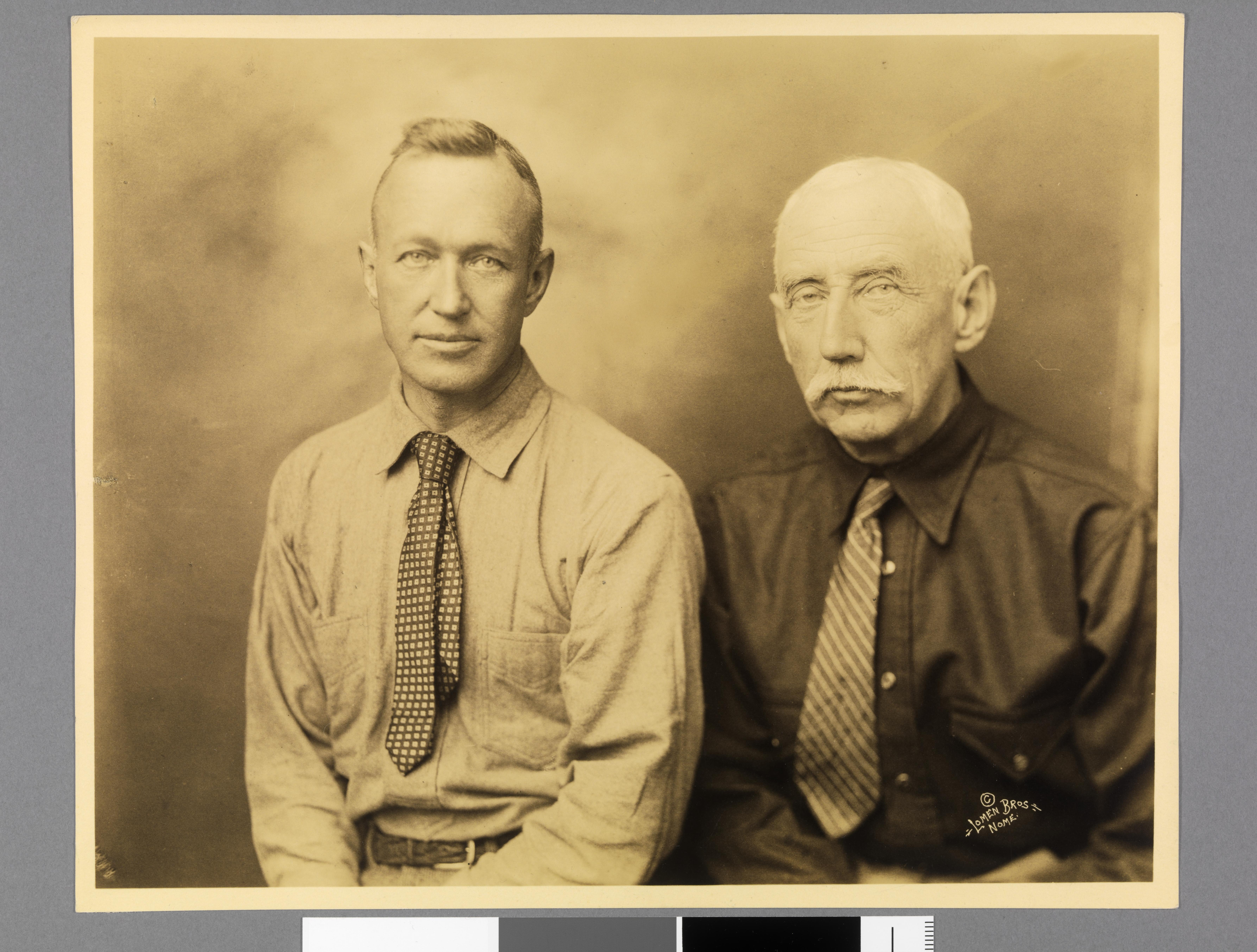 Bildet er hentet fra Nasjonalbibliotekets bildesamling Depicted person: Ellsworth, Lincoln Depicted person: Amundsen, Roald Engelbregt Gravning